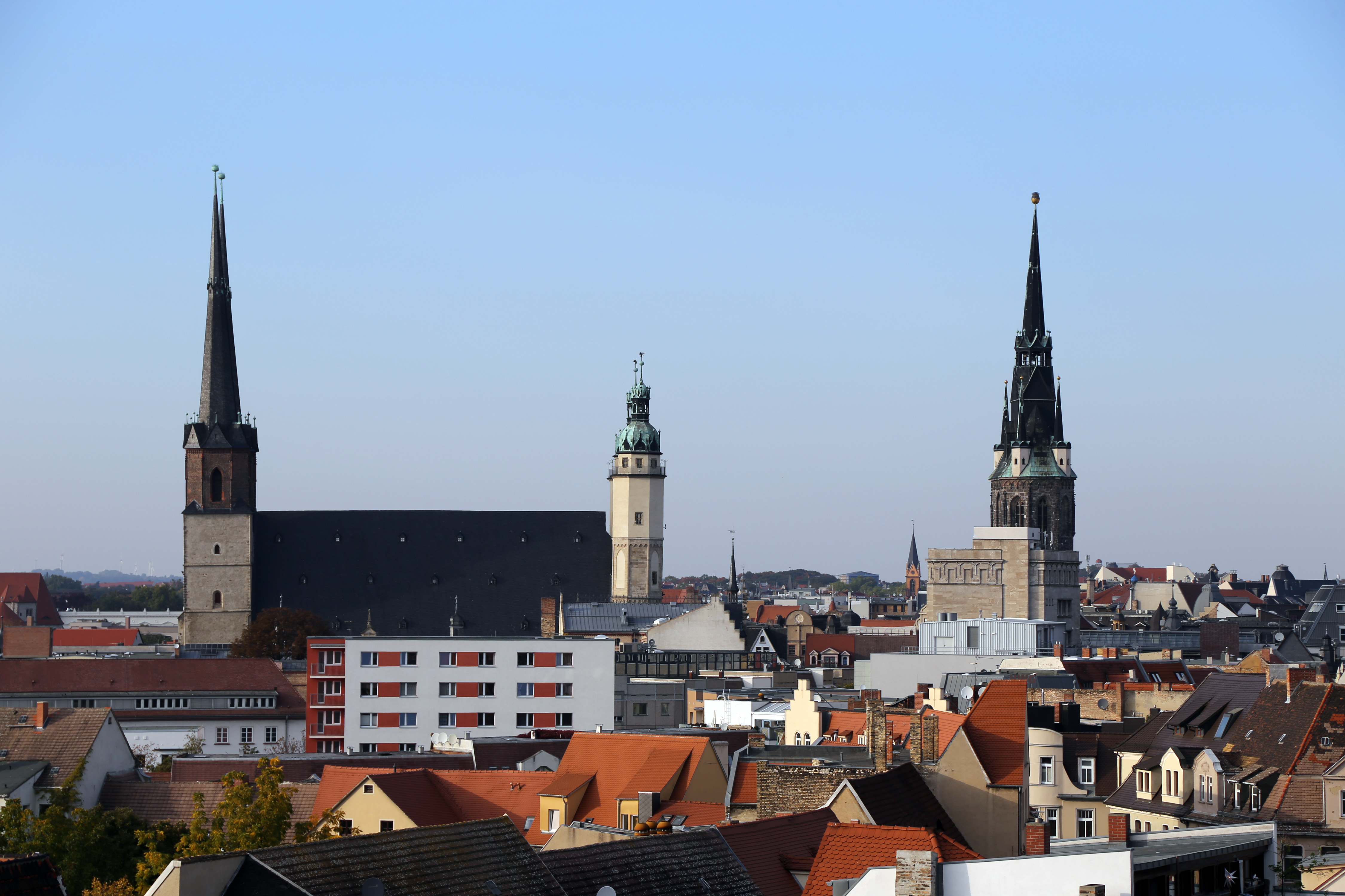 Blick zur Marktkirche Halle (Saale)